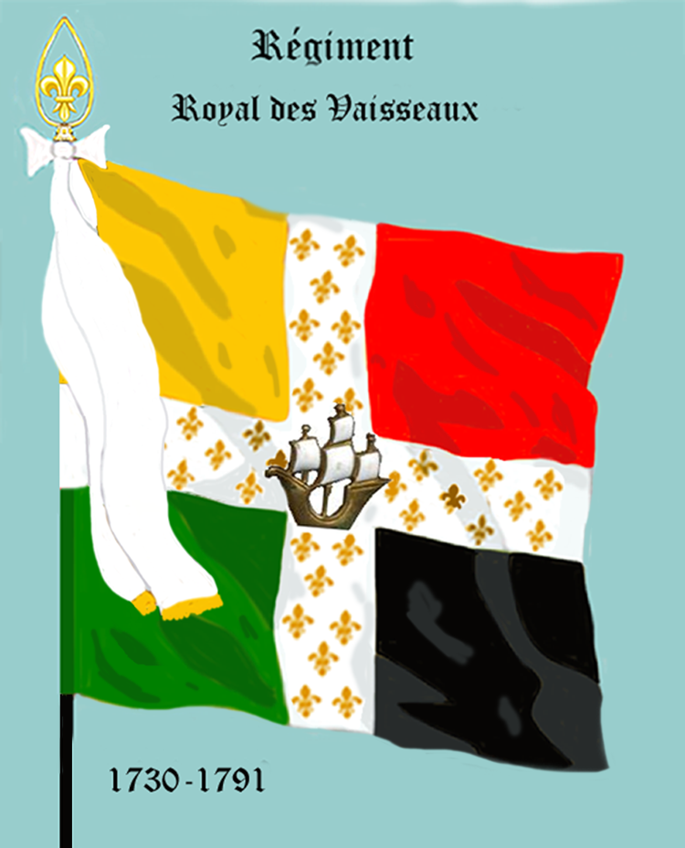 Ordonnanzfahne eines königlich französischen Infanterie-Regiments. - Entnommen und überarbeitet aus: „LES UNIFORMES ET LES DRAPEAUX DE L'ARMÉE DU ROI“ Marseille 1899. (Drapeau d'Ordonnance d' un régiment française d'infanterie royale.)